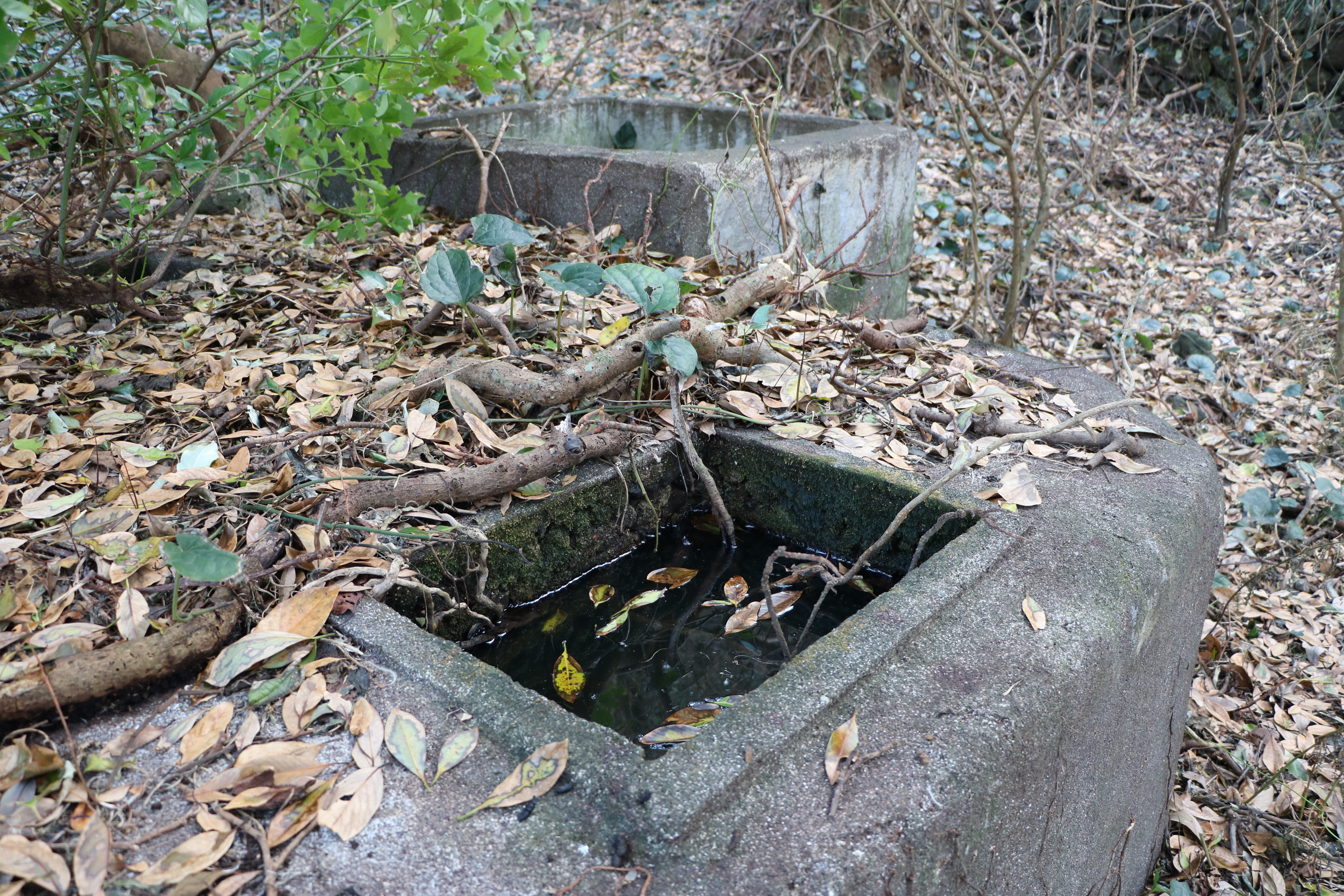 八丈小島鳥打地区の天水タンク跡（東京都八丈町）